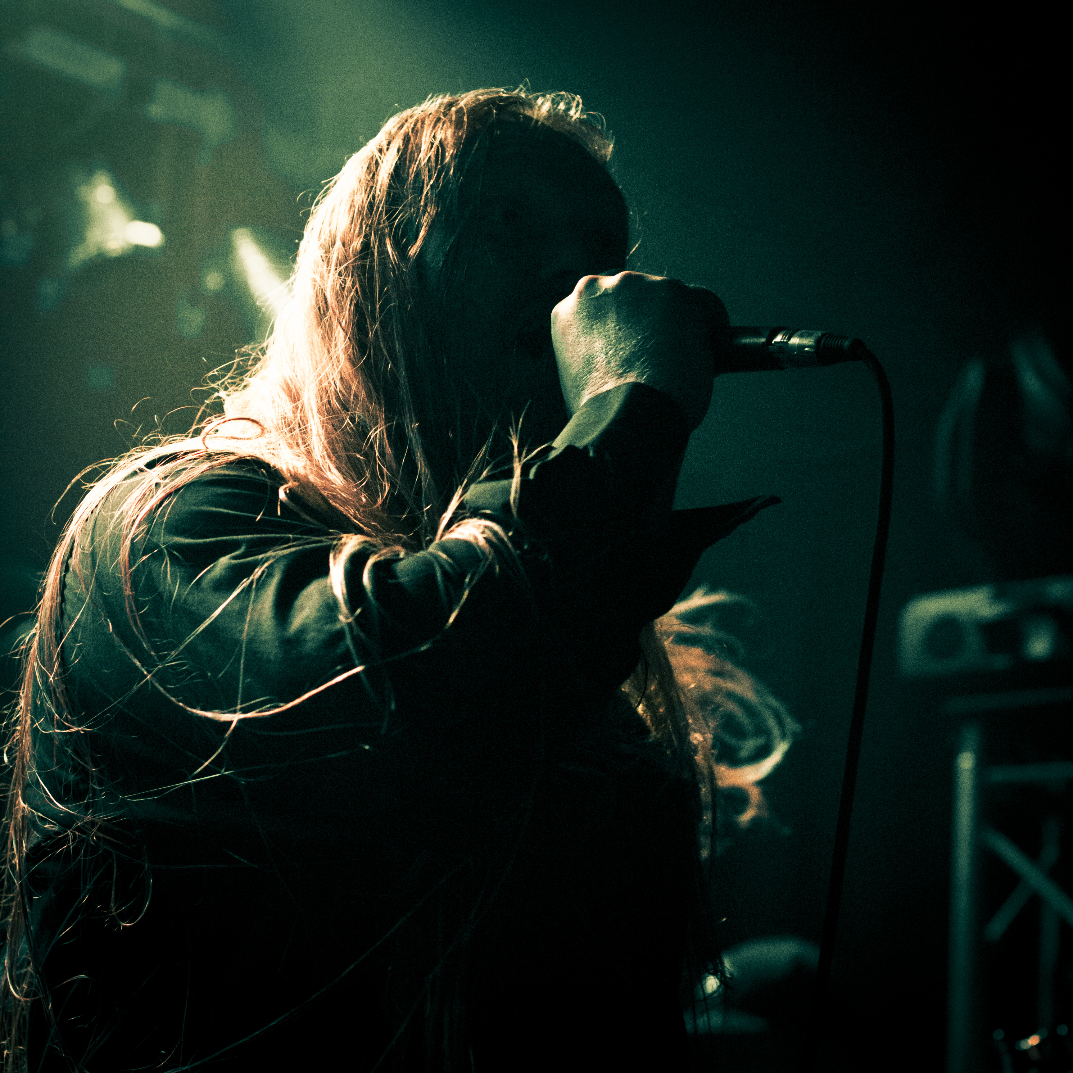 Photo de Ronny Hansen Chanteur d'Antestor prise au Blast of Eternity 2012.